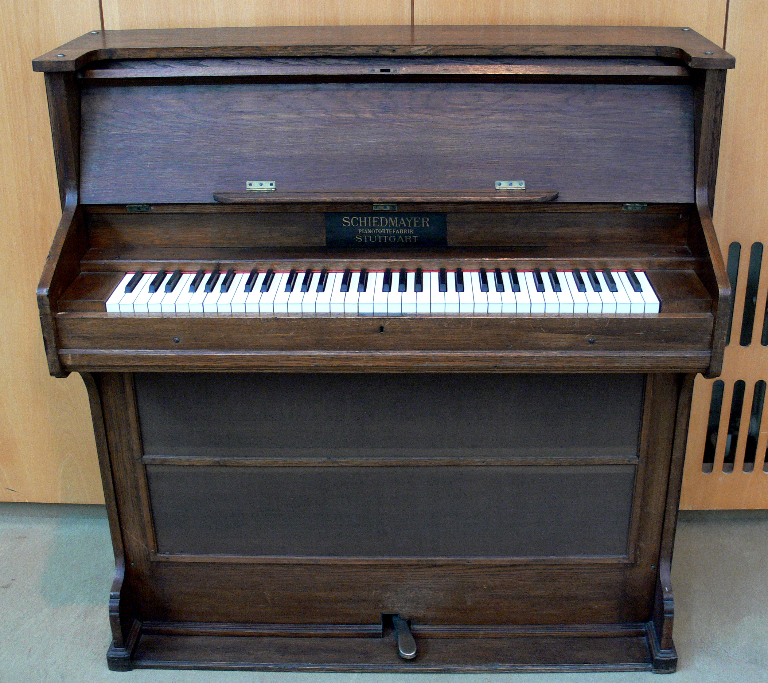 Celesta, Schiedmayer Pianofortefabrik, Stuttgart 1920 Musikinstrumentenmuseum Berlin, Kat.-Nr. 1592